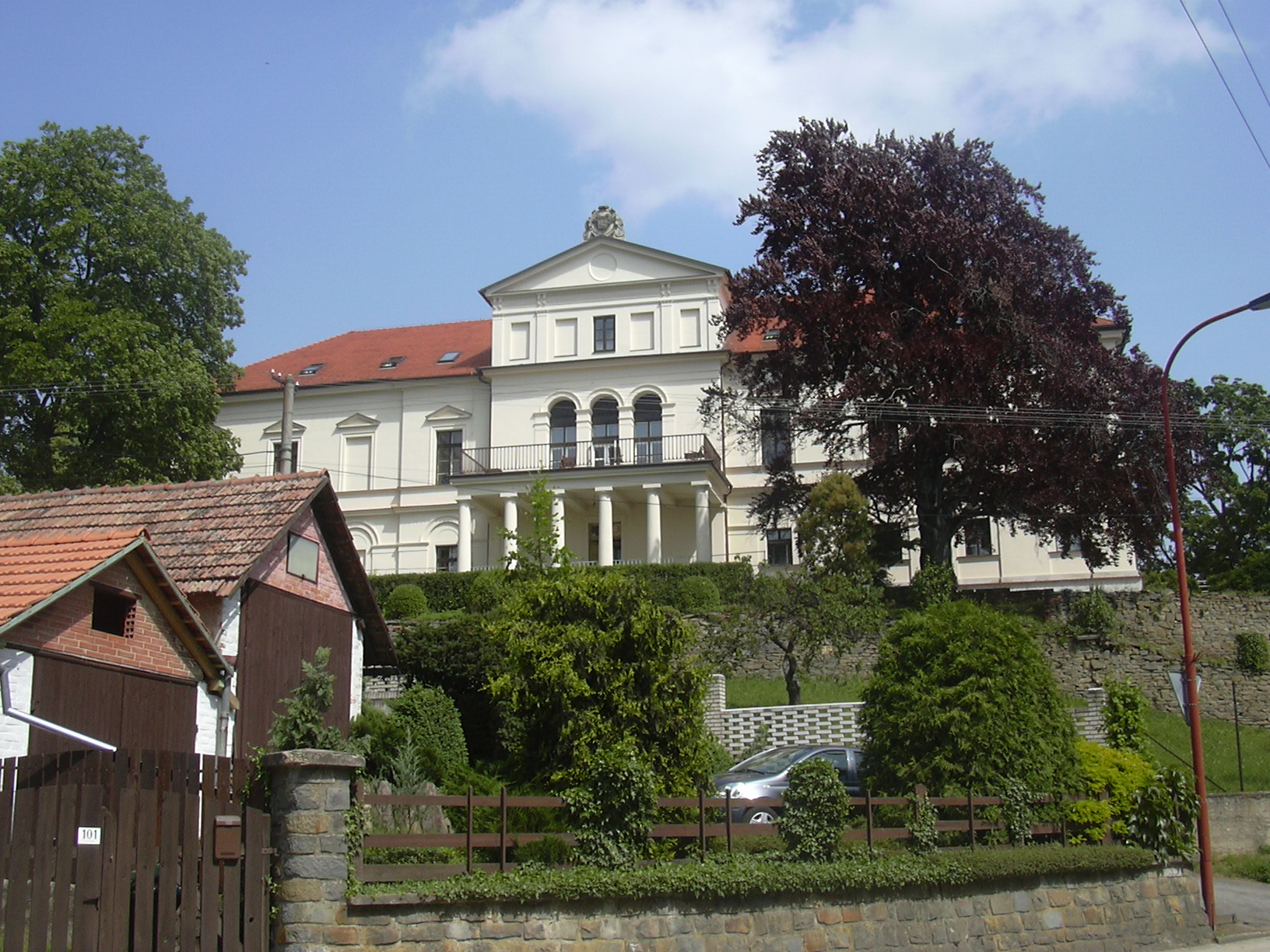 Zámek Habrovany (Vyškov District, Czech Republic)